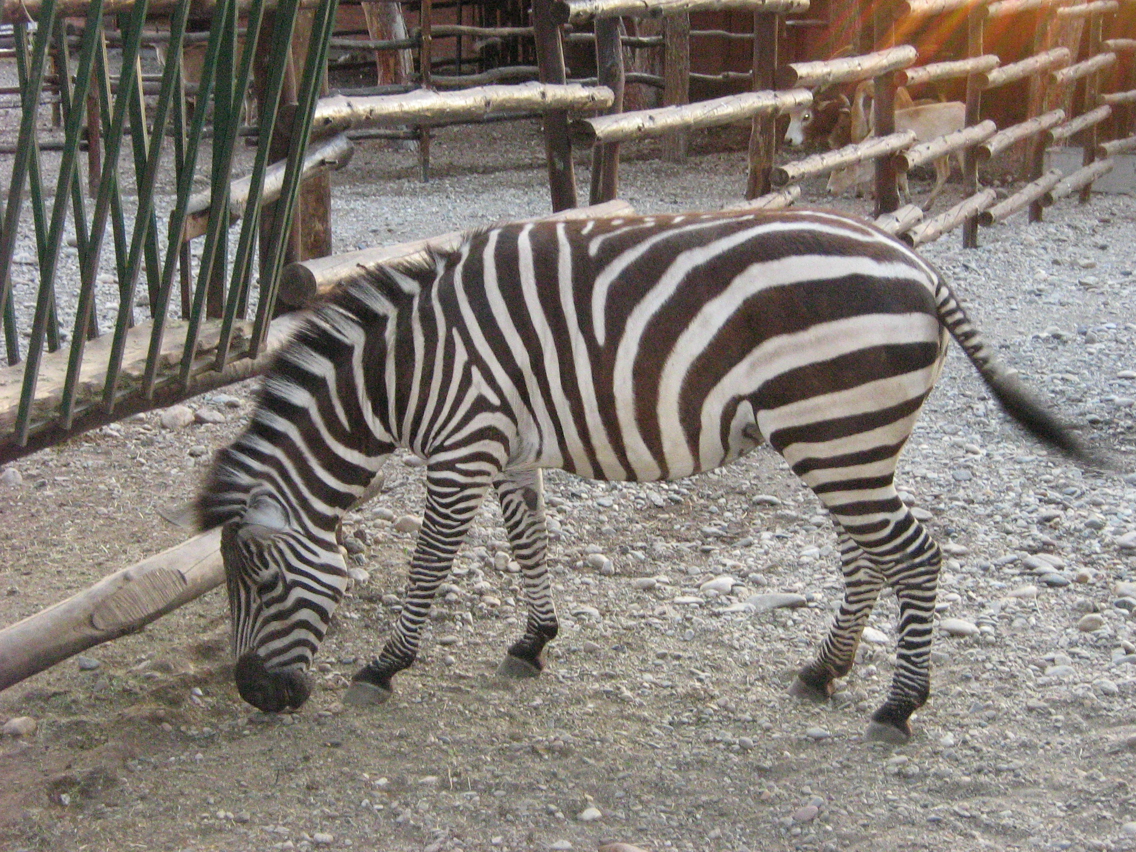 Зебра